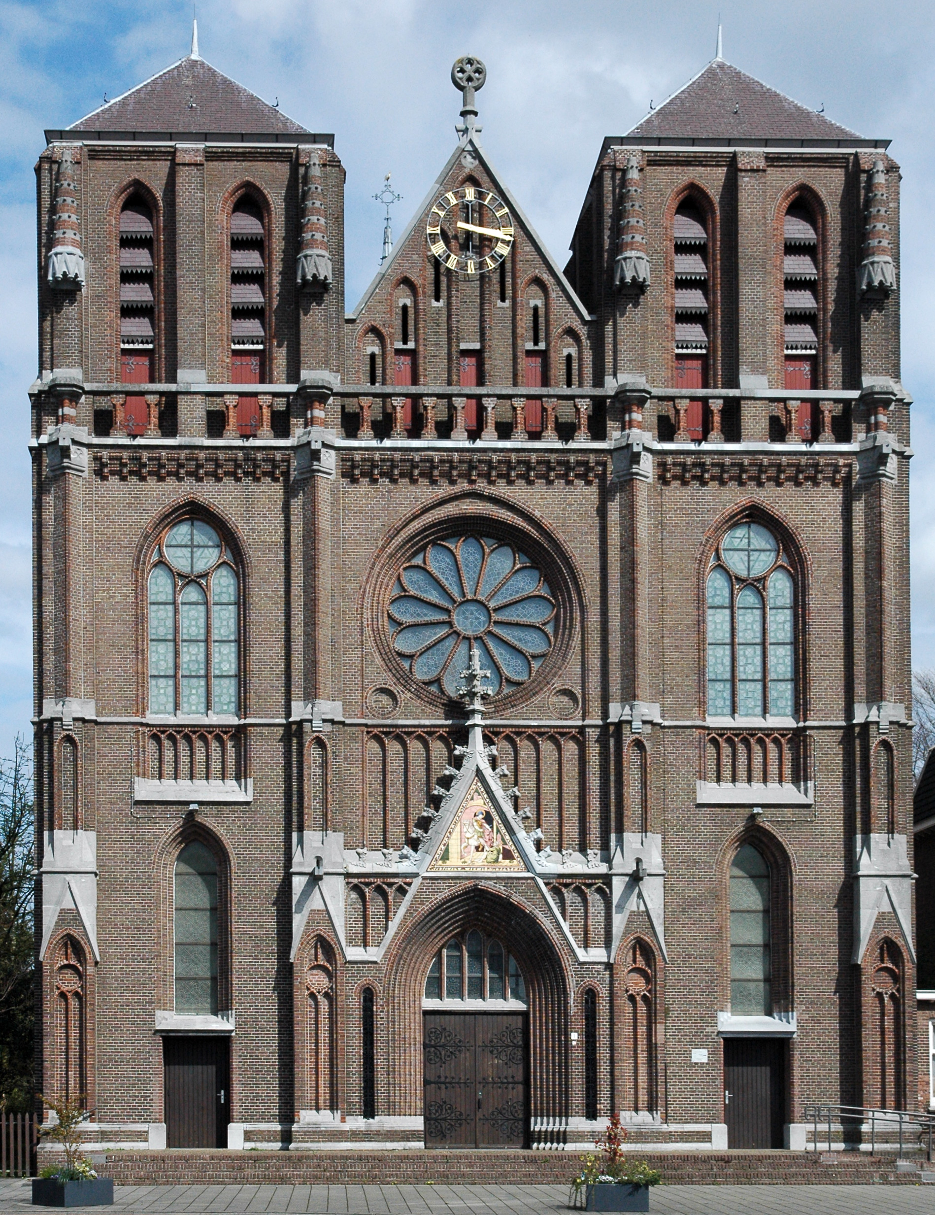 Sint-Martinuskerk, 't Hofke 1, Tongelre, Eindhoven, Nederland